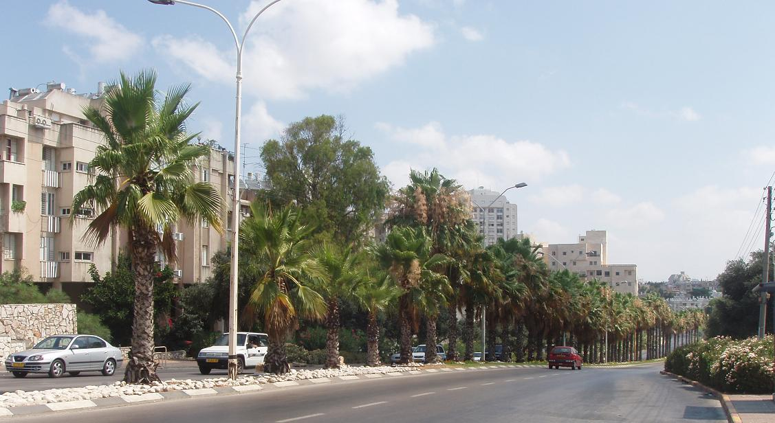 רחוב סוקולוב ברמת השרון, בקצהו המוביל להרצליה. צילם דוד שי.